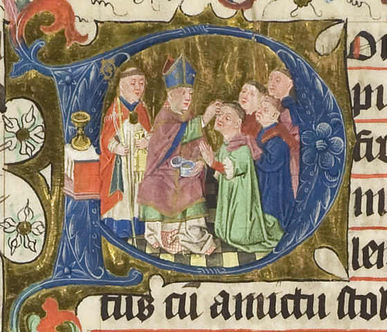 Hs. 400, f. 10r. Uitsnede initiaal:Bisschop die het vormsel toedient.